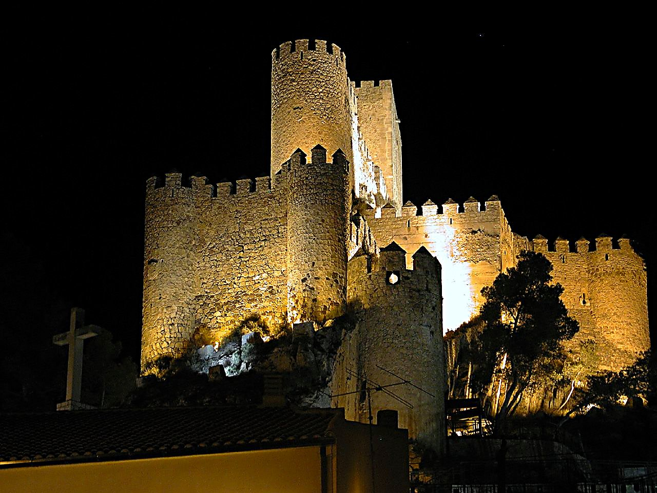 Castle of Almansa (Almansa).